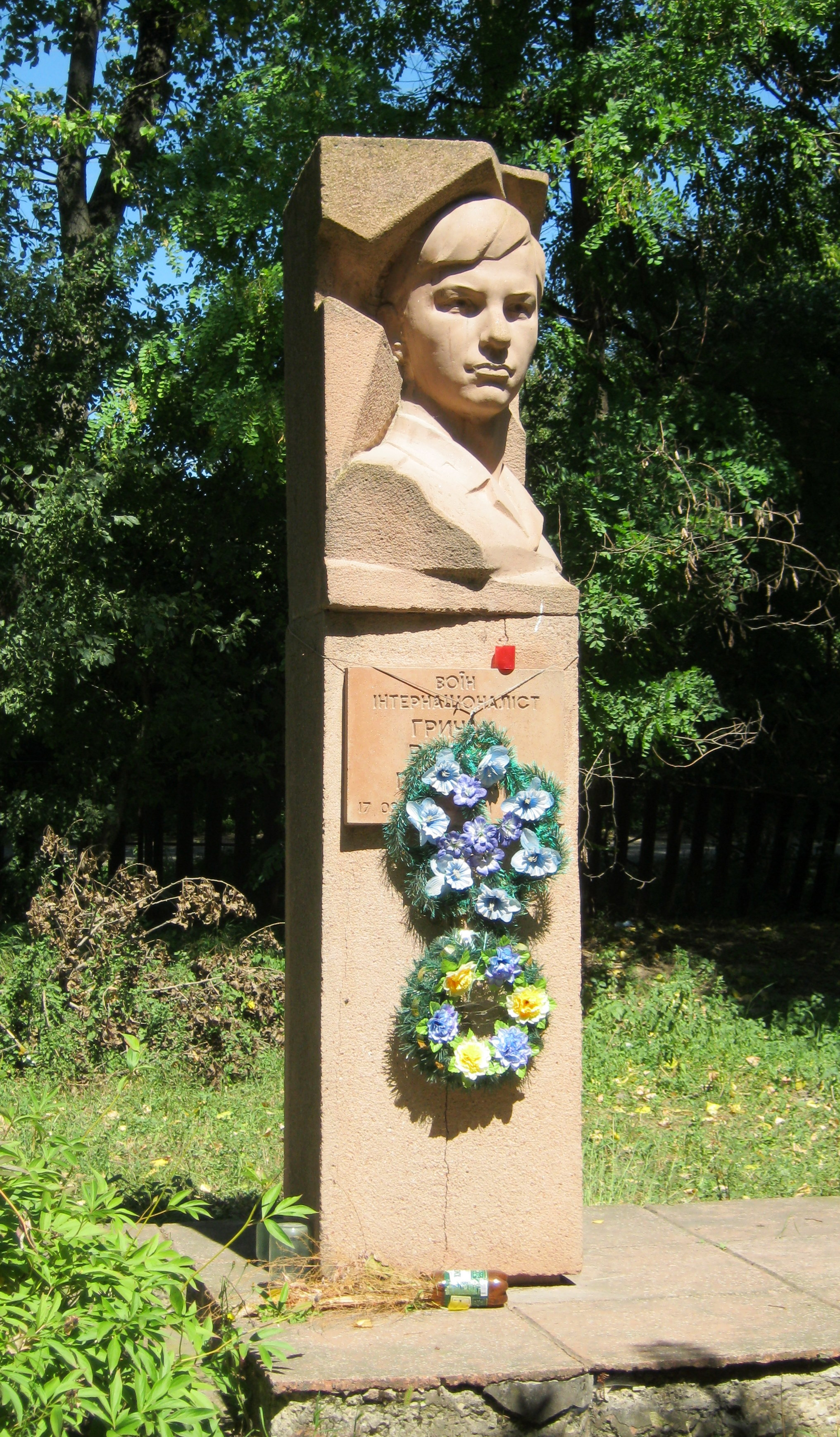 Пам'ятник воїнові-афганцеві В. Гричаку у селі Устя Борщівського району Тернопільської області